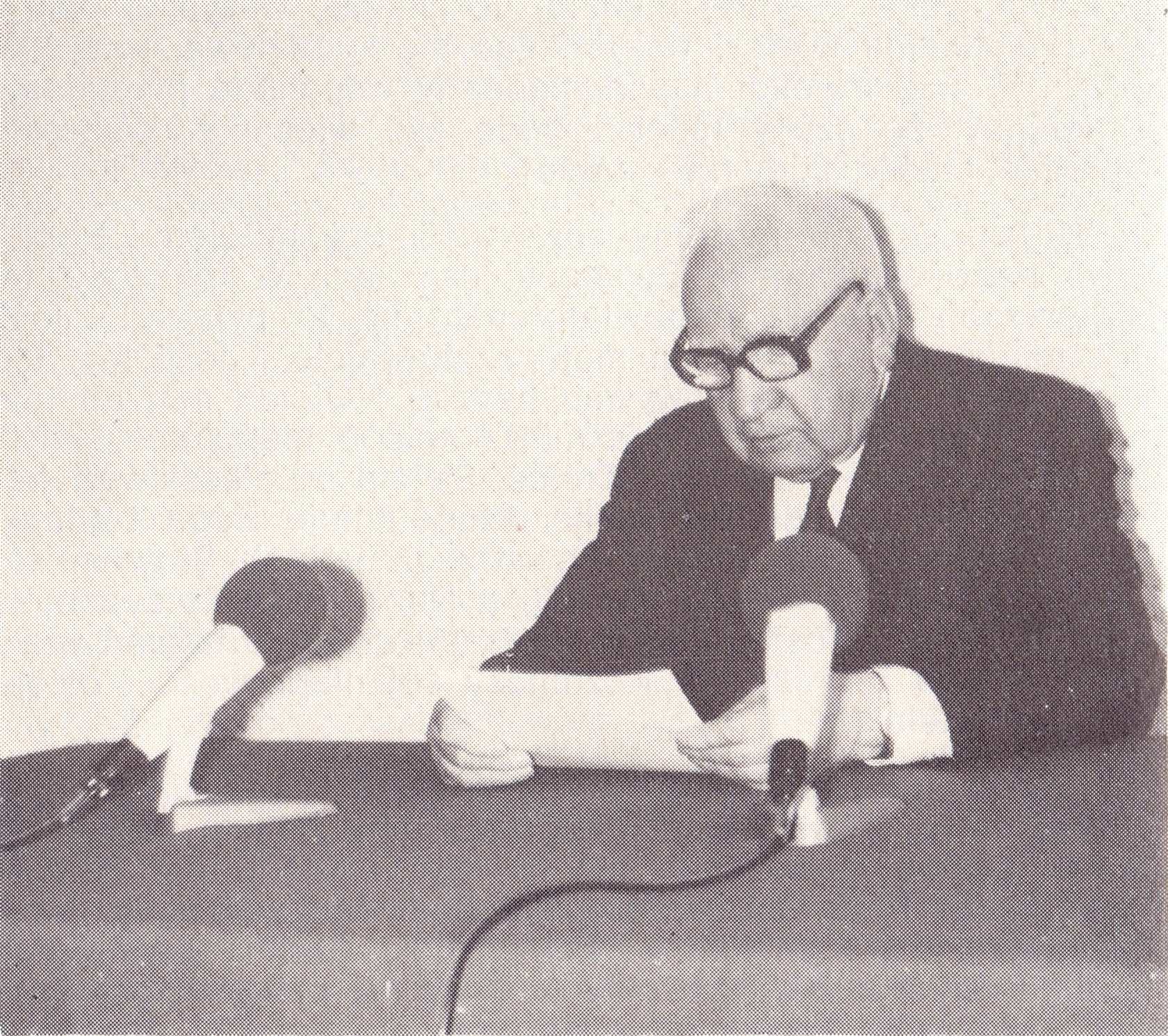 Stanisław Krakiewicz podczas nagrywania tekstu kazania radiowego dla audycji "Głos Eewangelii z Warszawy" (1974)